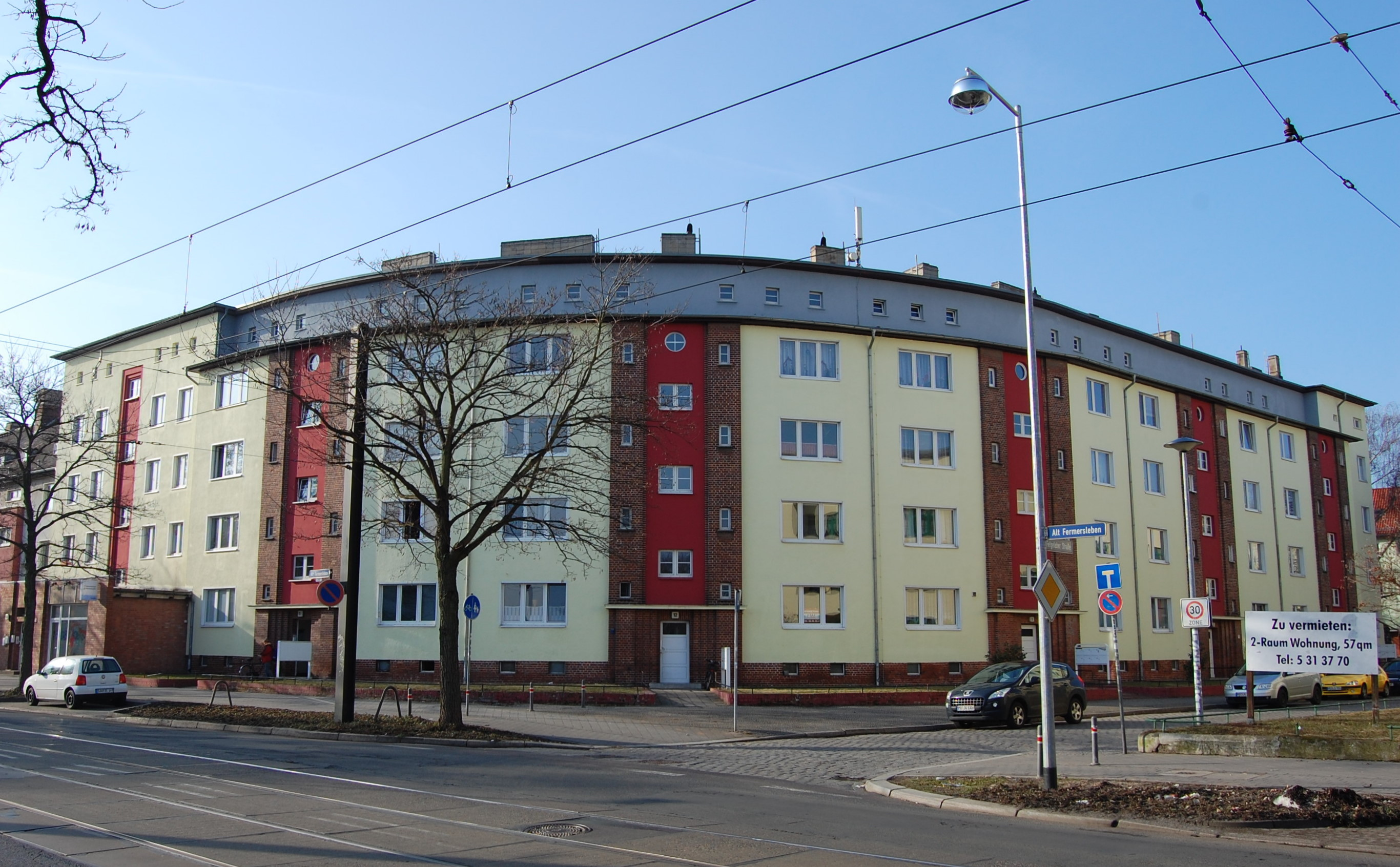 Siedlung Fermersleben, von F.W. Ferdinand Müller entworfenes Eckgebäude, 1934